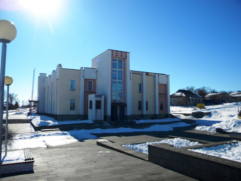 Дом культуры (Шаталовка, Белгородская область)